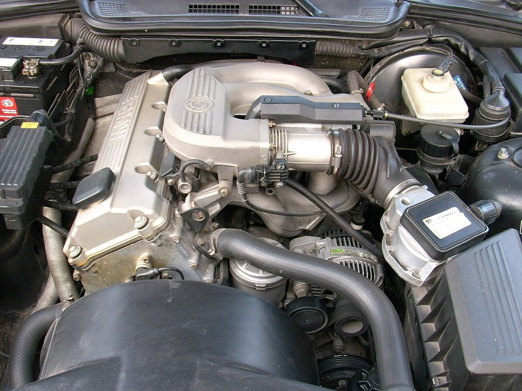 ulteriore frontale del vano motore di un BMW E36 316 Coupe del 97